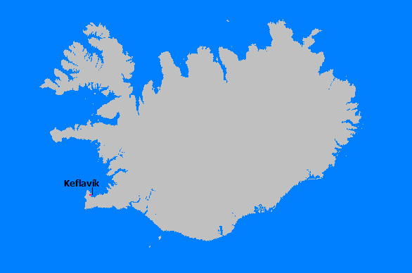 Kaupungin sijainti kartalla. Volapük: Topam in Lisladeän.